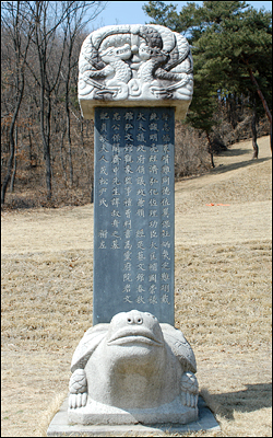 신숙주의 신도비